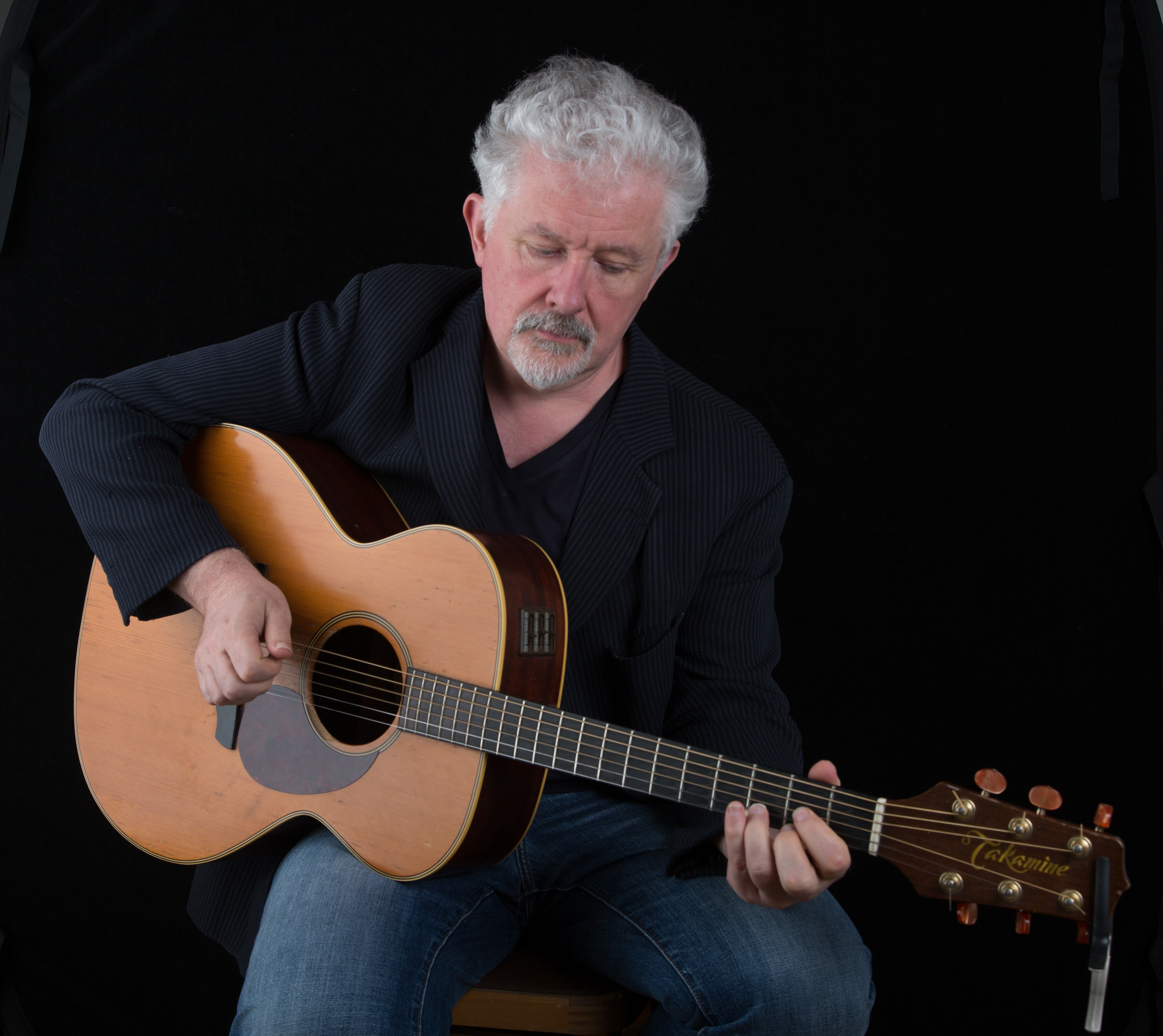 Tadhg Mac Dhonnagáin Grianghraf: Seán Ó Mainnín